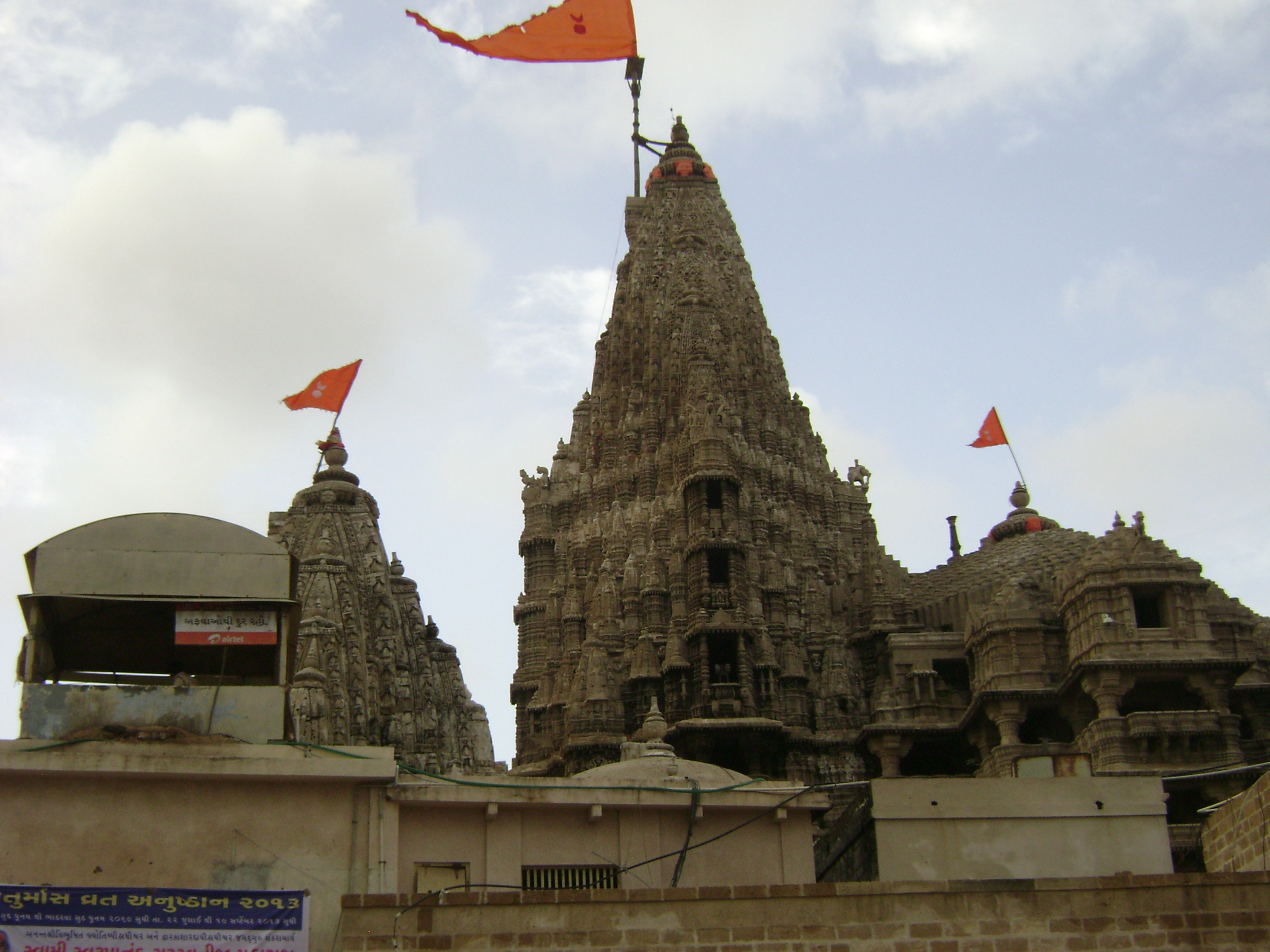 Dwarka temple towers